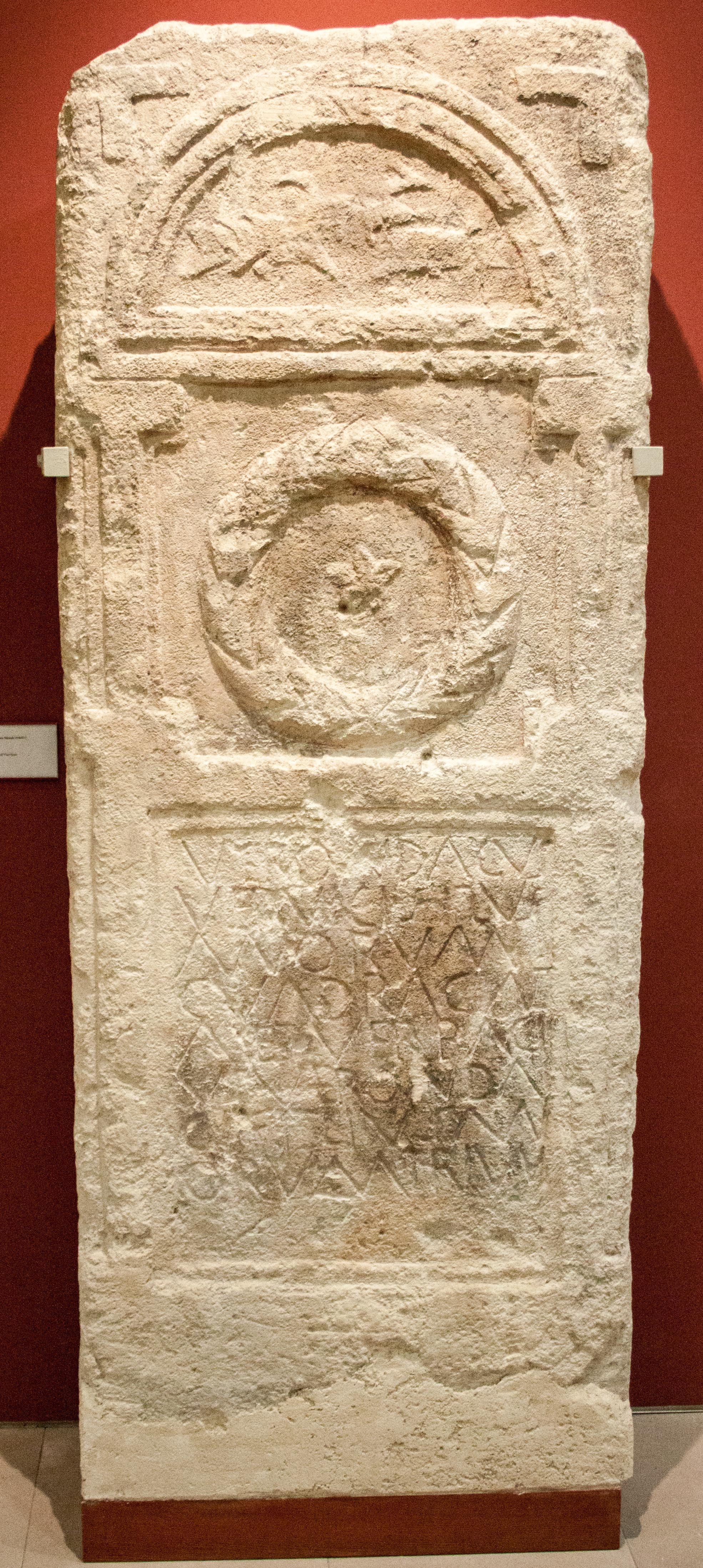 Stèle funéraire de Verondagus, fils de Vervicus, au musée national hongrois de Budapest, portant l'inscription latine transcrite par CIL III, 3381 = Schober 00125 = RIU-06, 01343 = ZPE-140-274 = AE 2002, 1205 : Verondagus / Vervici fil(i)us / an(n)orum / uadragint/a et Verbaci/us Veronda/gi filius an(n)/orum trium.